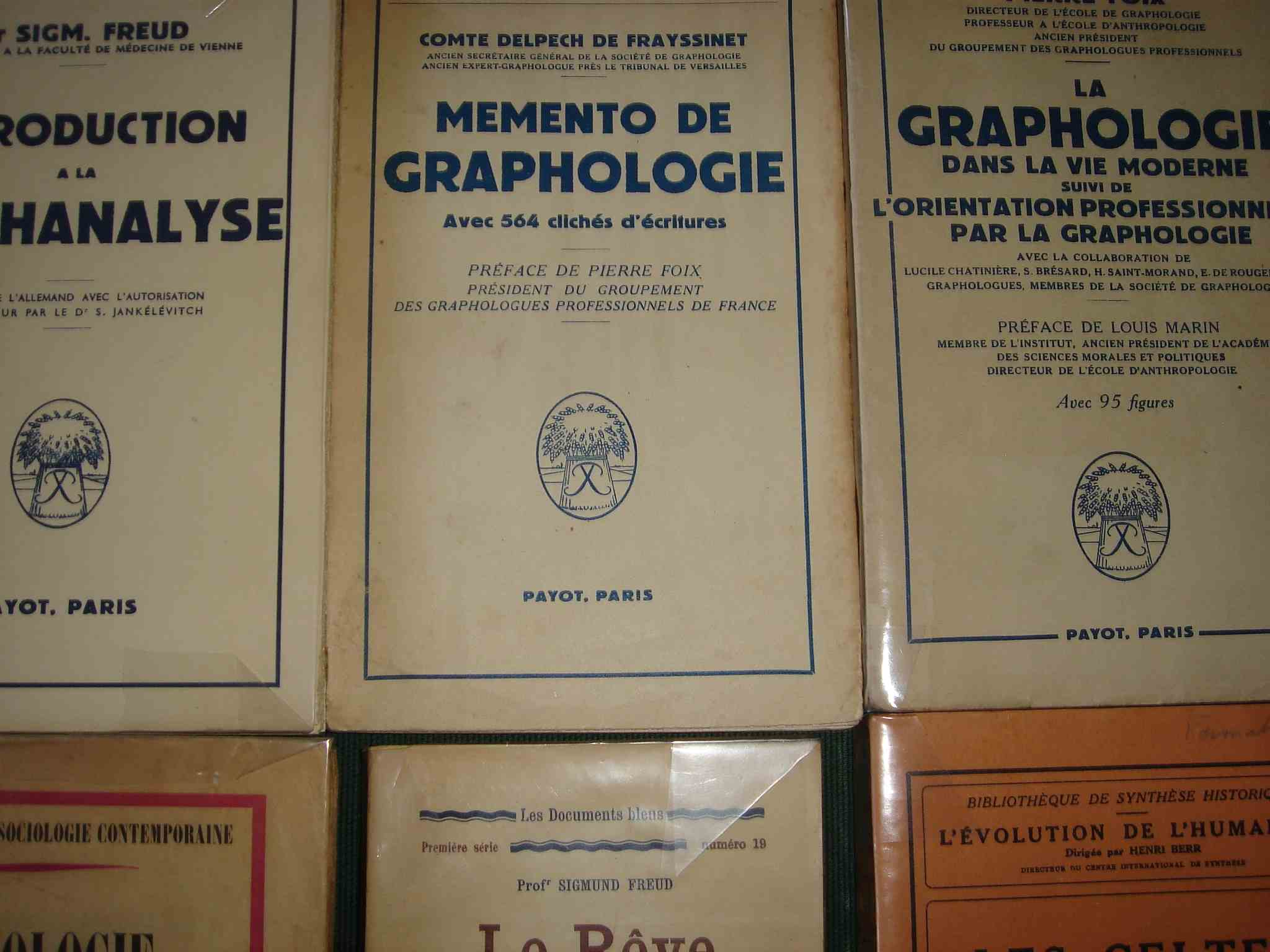 Livres de sciences humaines et de graphologie.